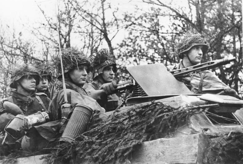 Ardennenoffensive, Soldaten in Schützenpanzer ADN-ZB/Archiv II.Weltkrieg 1939-45 An der Front im belgisch-luxemburgischen Raum während der Ardennenoffensive, Ende Dezember 1944. Auf einem Schützenpanzerwagen erwarten Kriegsfreiwillige einer Kampfgruppe der faschistischen deutschen Werhrmacht den Einsatzbefehl. (Göttert) [Ardennenoffensive.- Junge Soldaten in leicht getarntem Schützenpanzer (Sd.Kfz. 250 / Sd.Kfz. 251)]